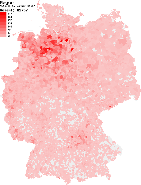 Verteilung des Nachnamens Meyer in Deutschland nach dem Telefonbuch mit Stand vom 6. Januar 2005 Source: selbst erstellt Ersteller: W. Baumgartner